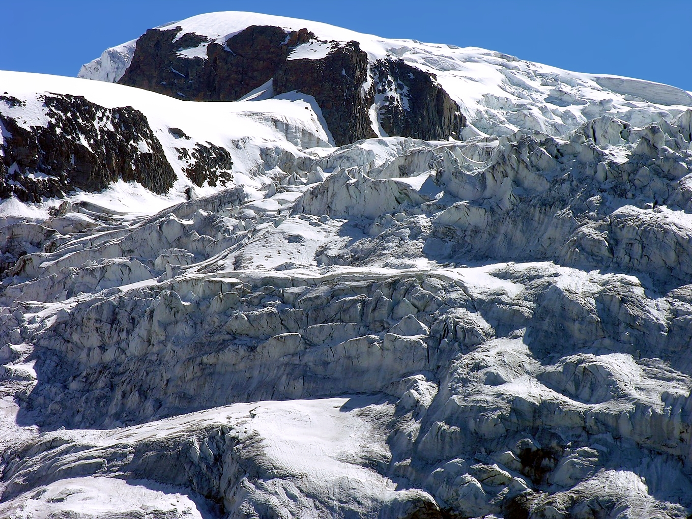 Seraccata del Ghiacciaio della Tribolazione - Alpi Graie - Italy.